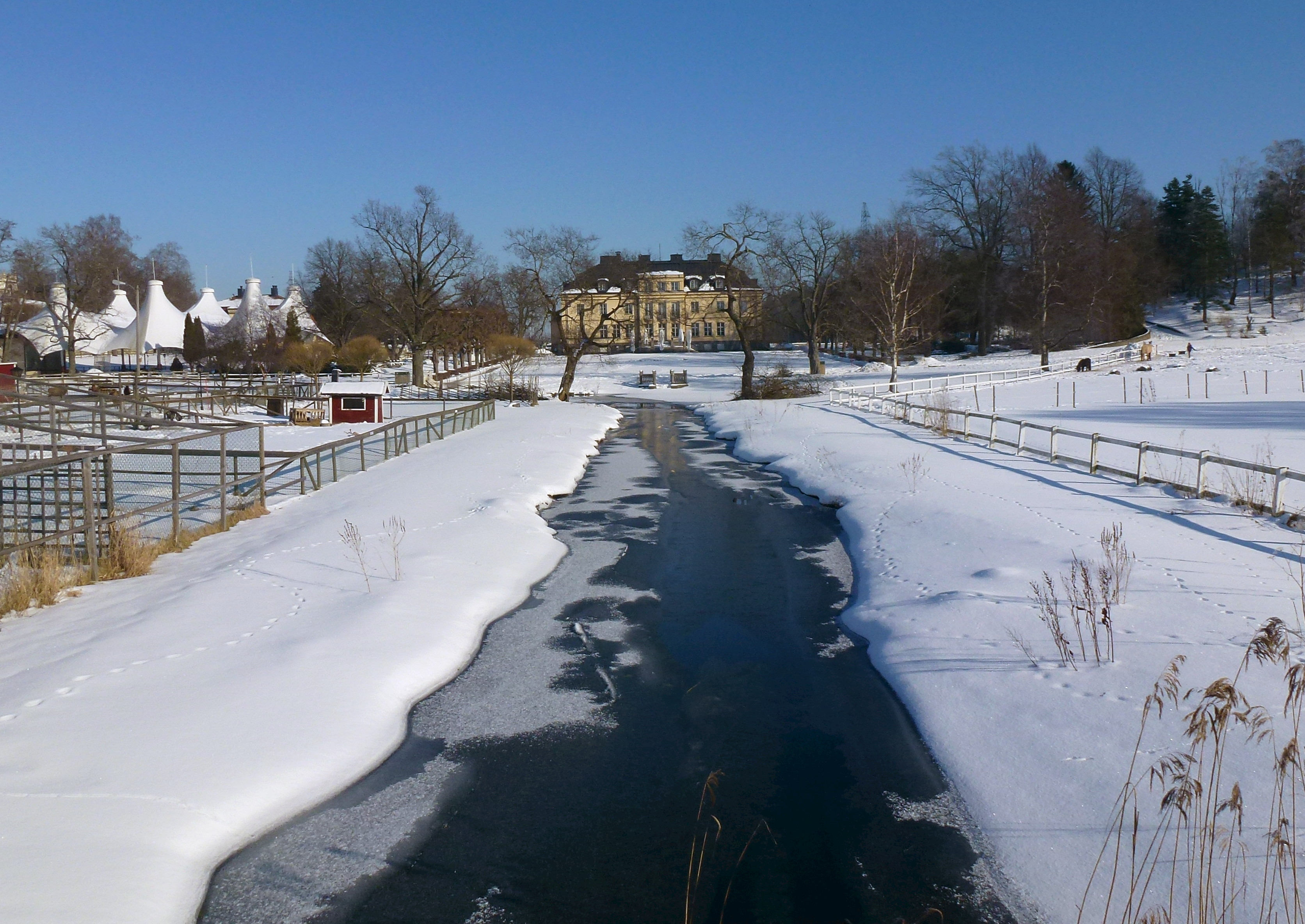 Hågelby park, Älvestaån